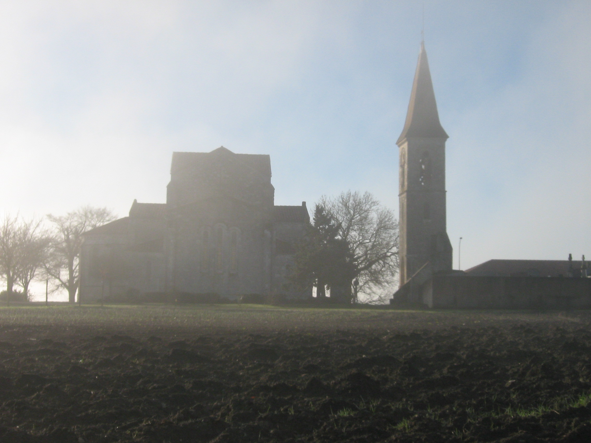 L'église de Saint-Vincent-de-Lamontjoie au matin de janvier par beau temps.